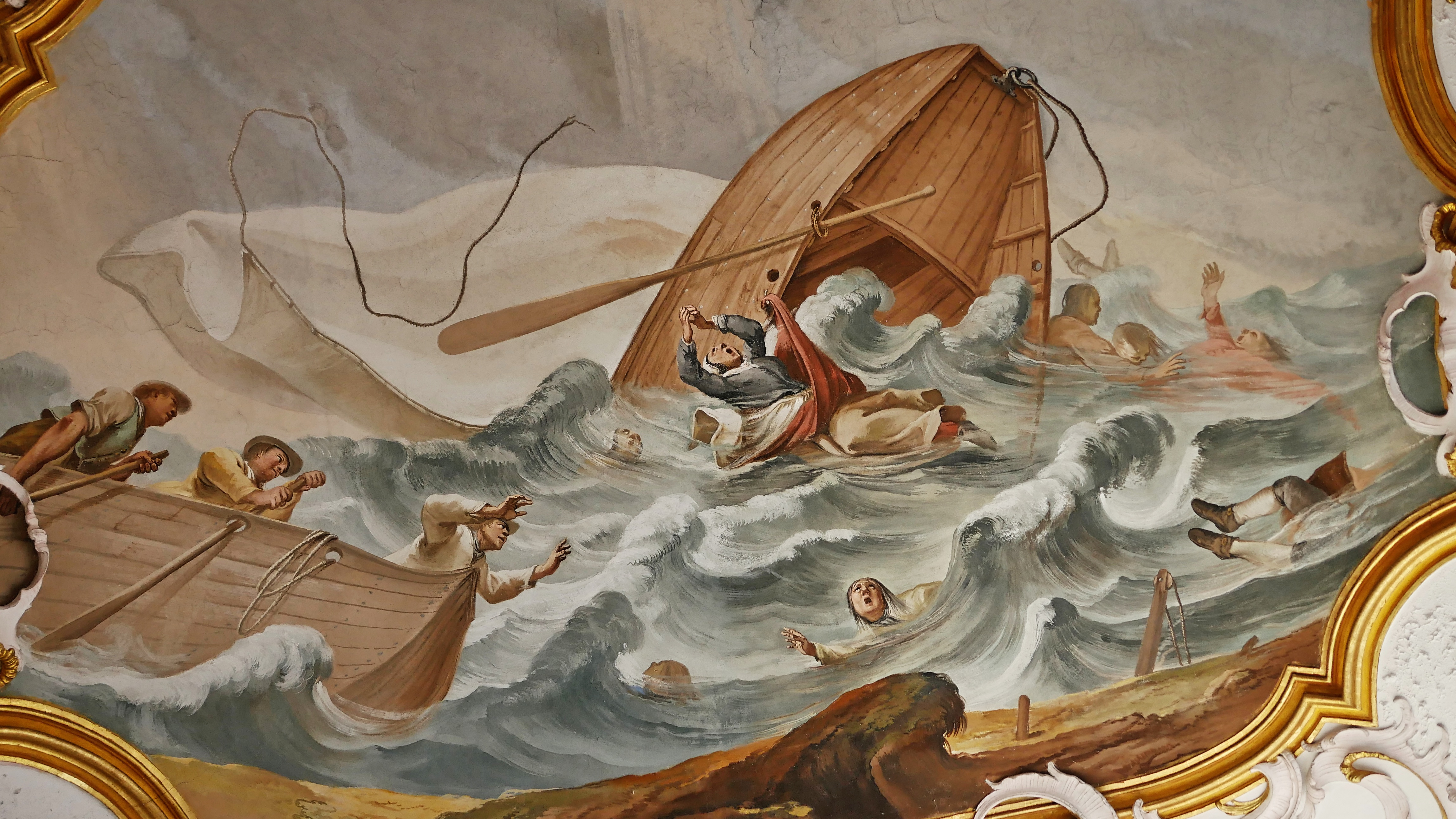 Mirakelfresken in der Wallfahrtskirche Maria Steinbach: M. A. Bruggerin Gollberg [m8] Auf dem Bild ist ein gekentertes Schiff auf dem Bodensee erkennbar. Unter den Schiffbrüchigen in der Mitte des Bildes befindet sich die Bruggerin von Gollberg. Sie schwimmt auf dem Rücken und erhebt ihre Hände zur oben am Himmel erscheinenden Steinbacher Schmerzensmutter als ihrer letzten Hoffnung. Eigentlich sollte ihre Wallfahrt nach Maria Einsiedeln gehen, aber auf dem Bodensee entwickelte sich jäh ein Sturm und das Schiff mit 57 Personen kenterte. Aufgrund des Wallfahrtgelübdes, das sie in ihrer verzweifelten Lage macht, wird sie wundersam gerettet. Zeitpunkt des Geschehens ist die Fastenzeit 1734.